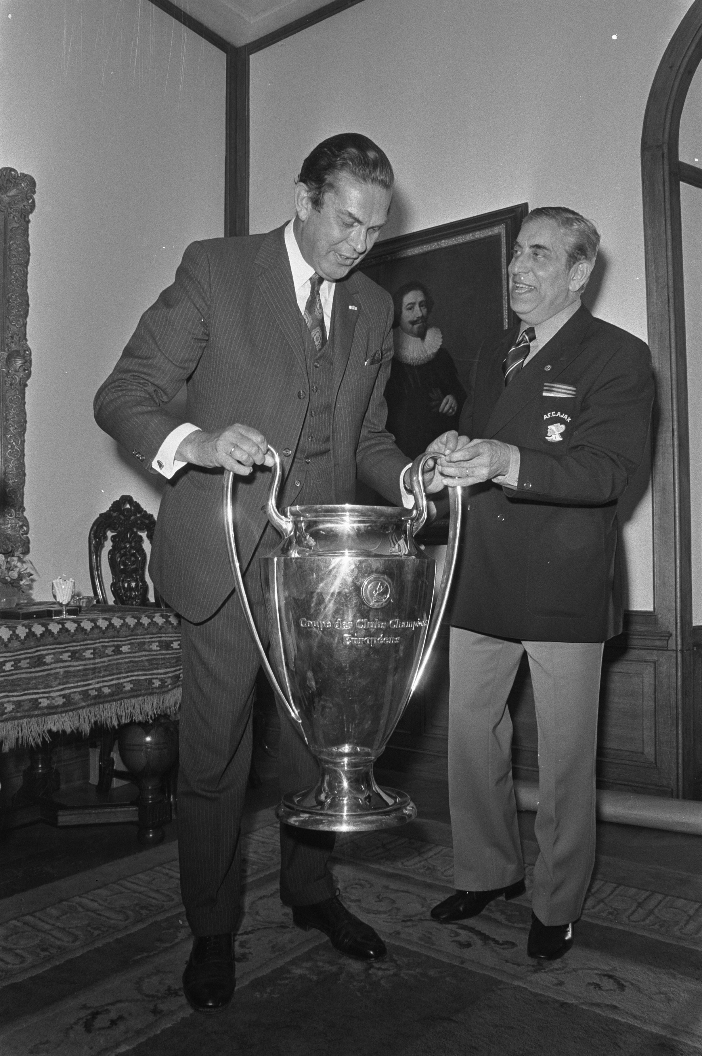 Collectie / Archief : Fotocollectie Anefo Reportage / Serie : Ontvangst van de Ajax-spelers in Den Haag door het kabinet na het winnen van de Europacup-1 finale Beschrijving : Minister-president Barend Biesheuvel (l) en Ajax-trainer Stefan Kovacs met de cup Datum : 3 juni 1972 Locatie : Den Haag, Zuid-Holland Trefwoorden : ministers-presidenten, ontvangsten, sportprijzen, trainers, voetbal Persoonsnaam : Biesheuvel, Barend, Kovacs, Stefan Instellingsnaam : AJAX Fotograaf : Fotograaf Onbekend / Anefo Auteursrechthebbende : Nationaal Archief Materiaalsoort : Negatief (zwart/wit) Nummer archiefinventaris : bekijk toegang 2.24.01.05 Bestanddeelnummer : 925-6428